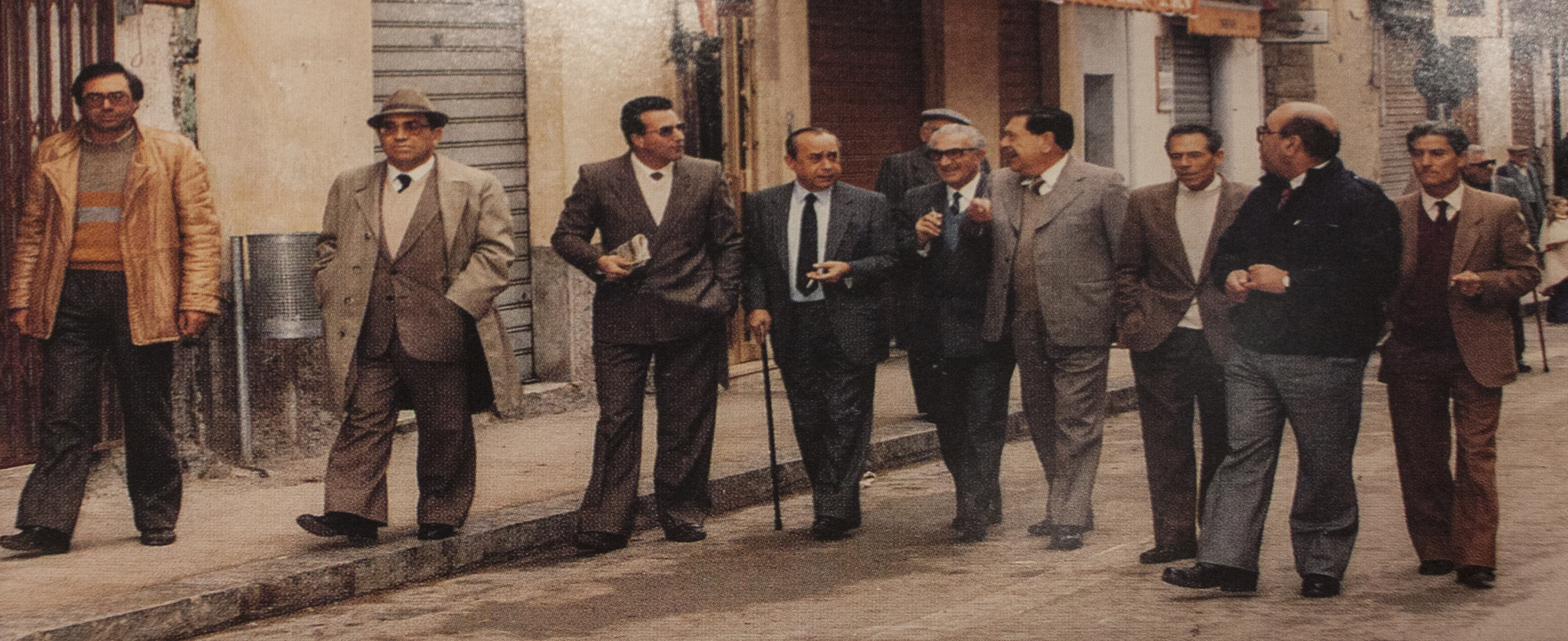 Leonardo Sciascia con amici a Racalmuto, foto di una foto